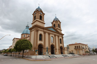 Basilica Menor Nuestra Senyora del Rosario. Frente y casa parroquial. Villa del Rosario, Còrdoba, Argentina